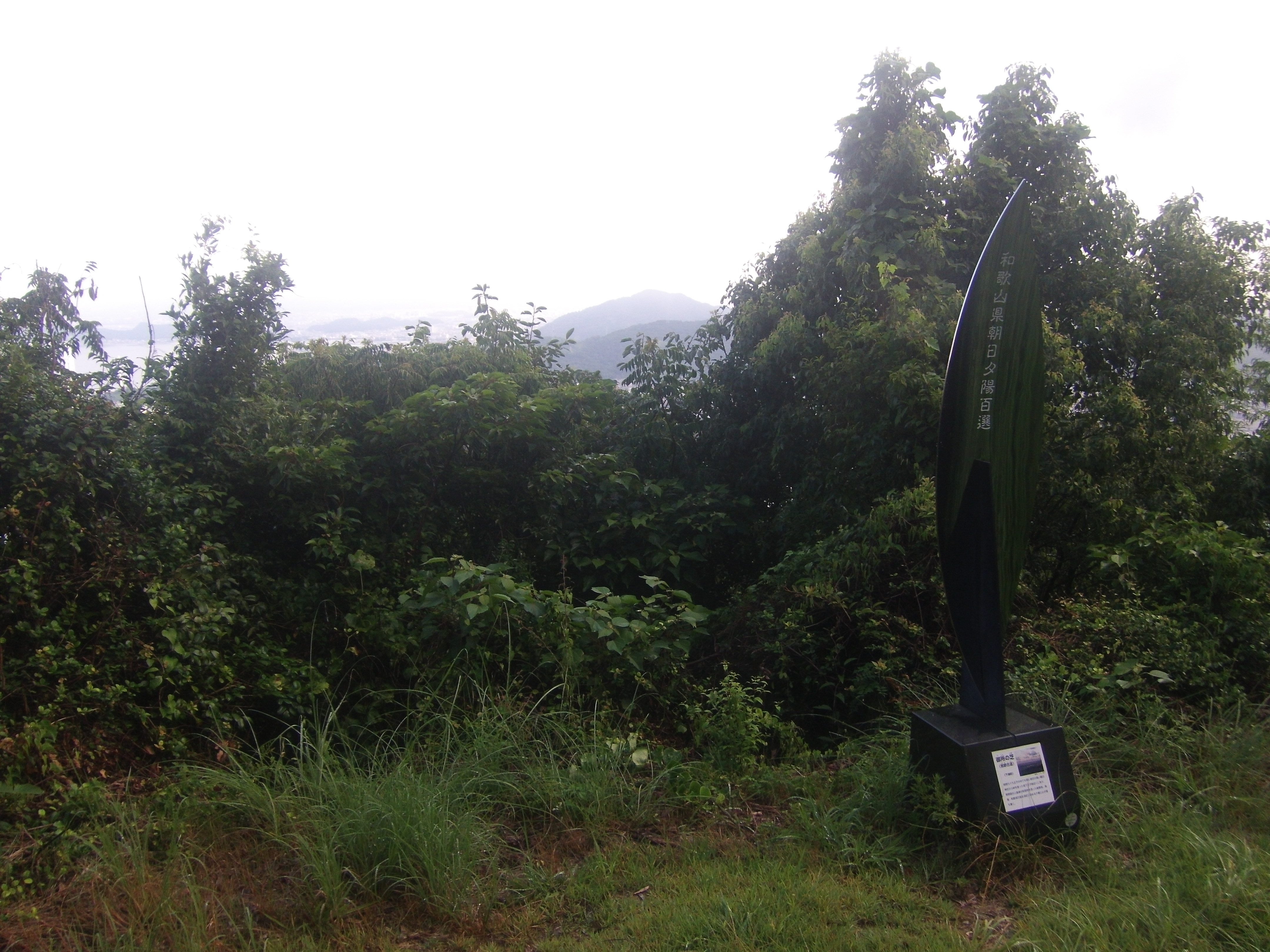 熊野古道・紀伊路の名所「御所の芝」